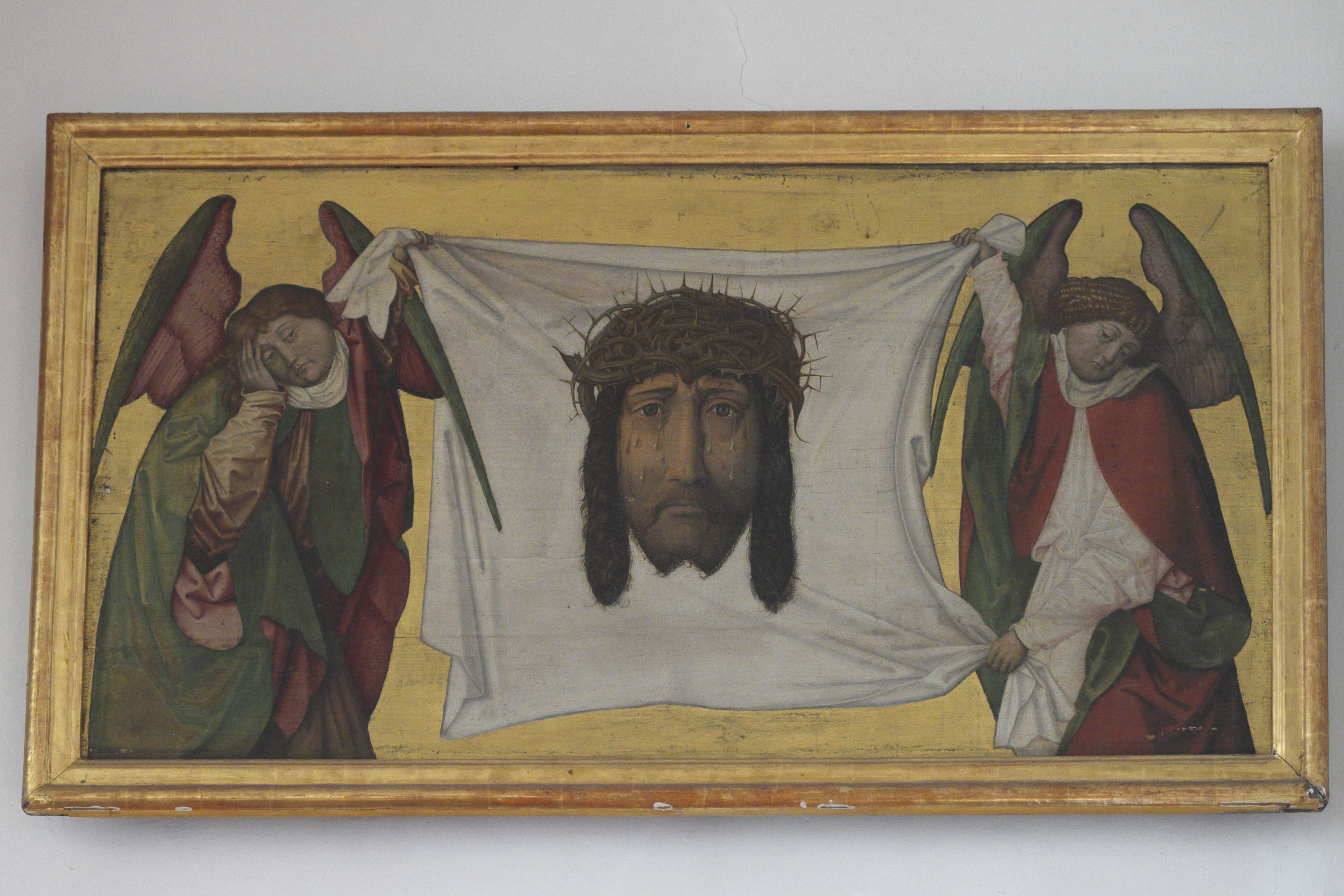 Katholische Pfarrkirche St. Michael in Inzell im Landkreis Traunstein (Bayern/Deutschland), Schweißtuch der Veronika